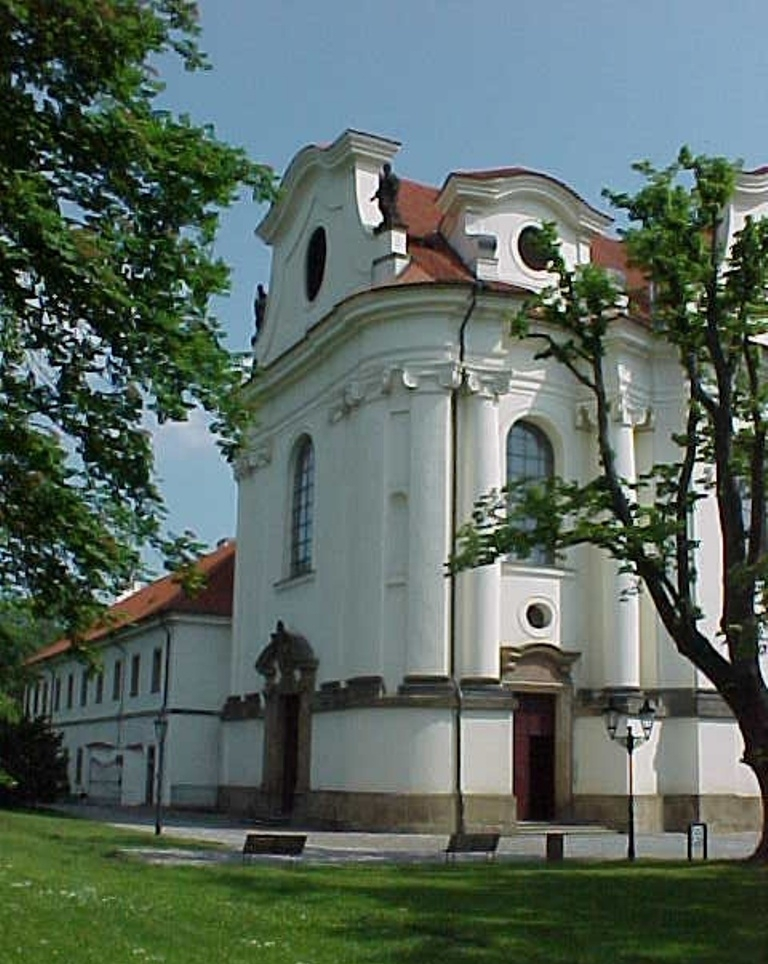 Hlavní vchod kostela sv. Markéty v Břevnovském klášteře v Praze.